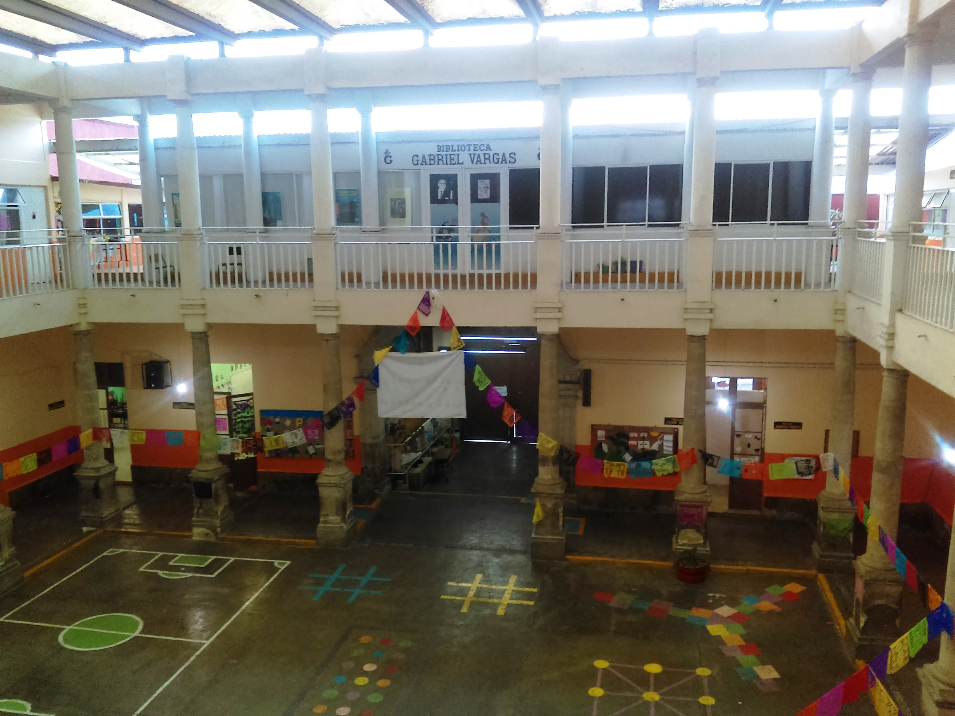 Casa Colorada en Pachuca, México.